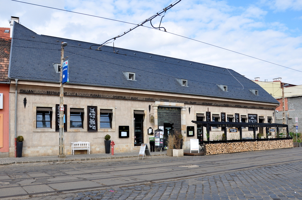 Bécsi út 56. (Symbol Budapest) This is a photo of a monument in Hungary. Identifier: 330